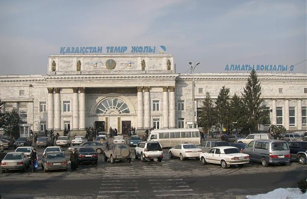 Железнодорожный вокзал Алматы-2